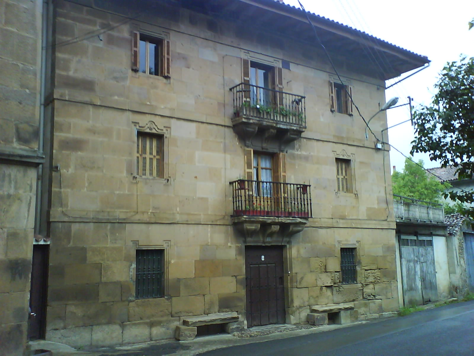 Cegama. Guipúzcoa, País Vasco (España).